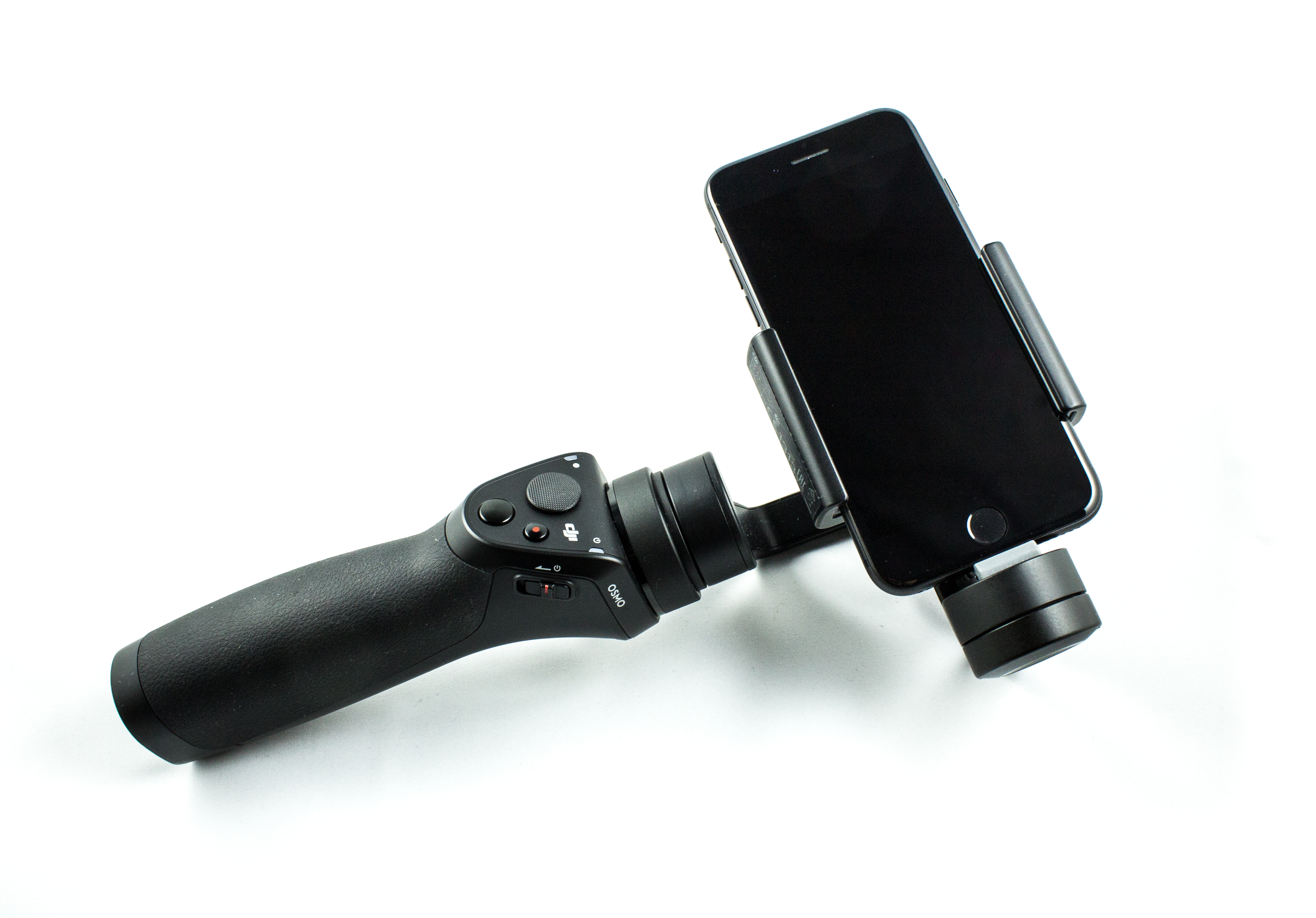 DJI OSMO mobile (with iPhone 7)